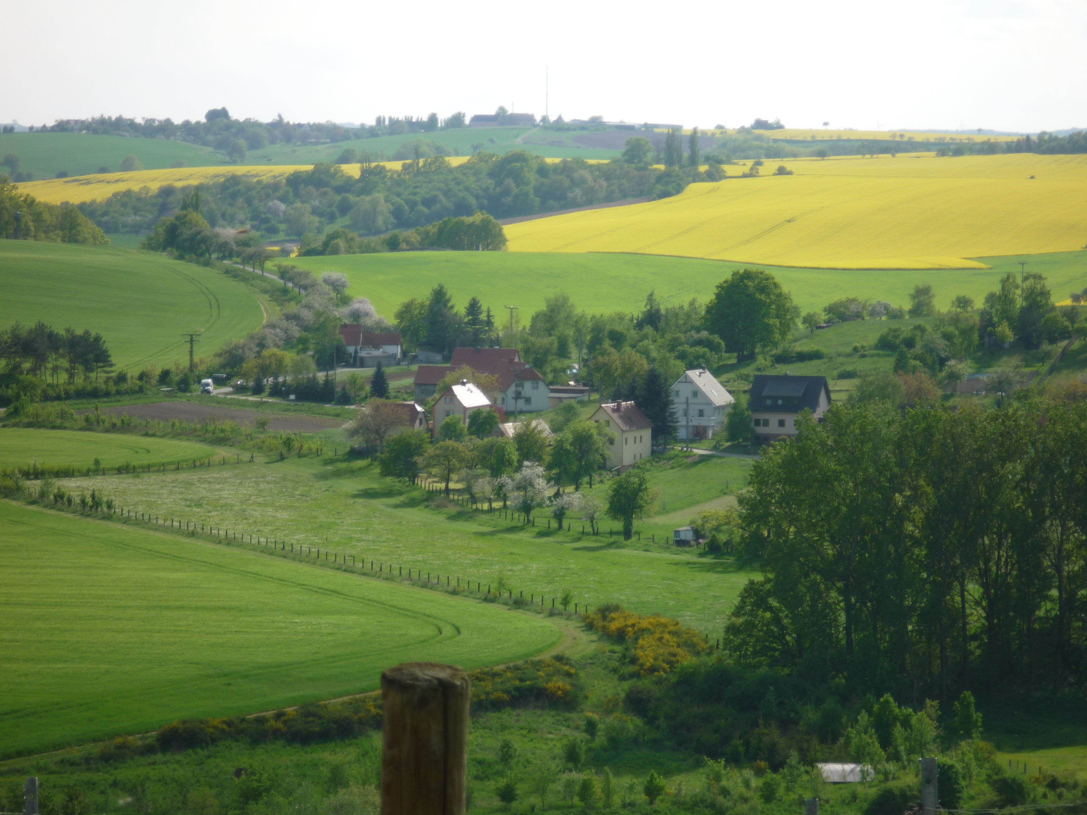 Blick auf Hebelei, linkselbischer Ortsteil von Diera-Zehren von der Goldkuppe (rechte Elbseite) aus fotografiert